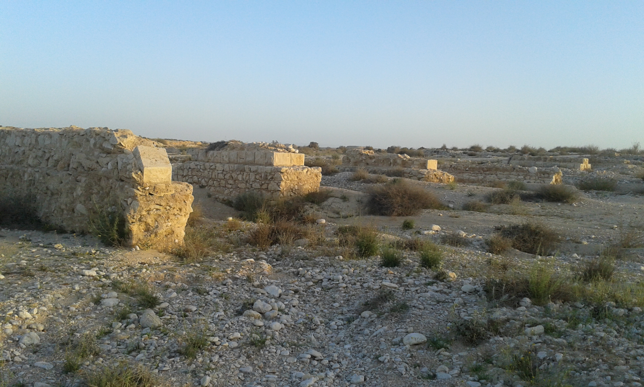 גשר הרכבת הטורקי והבריטי בניצנה